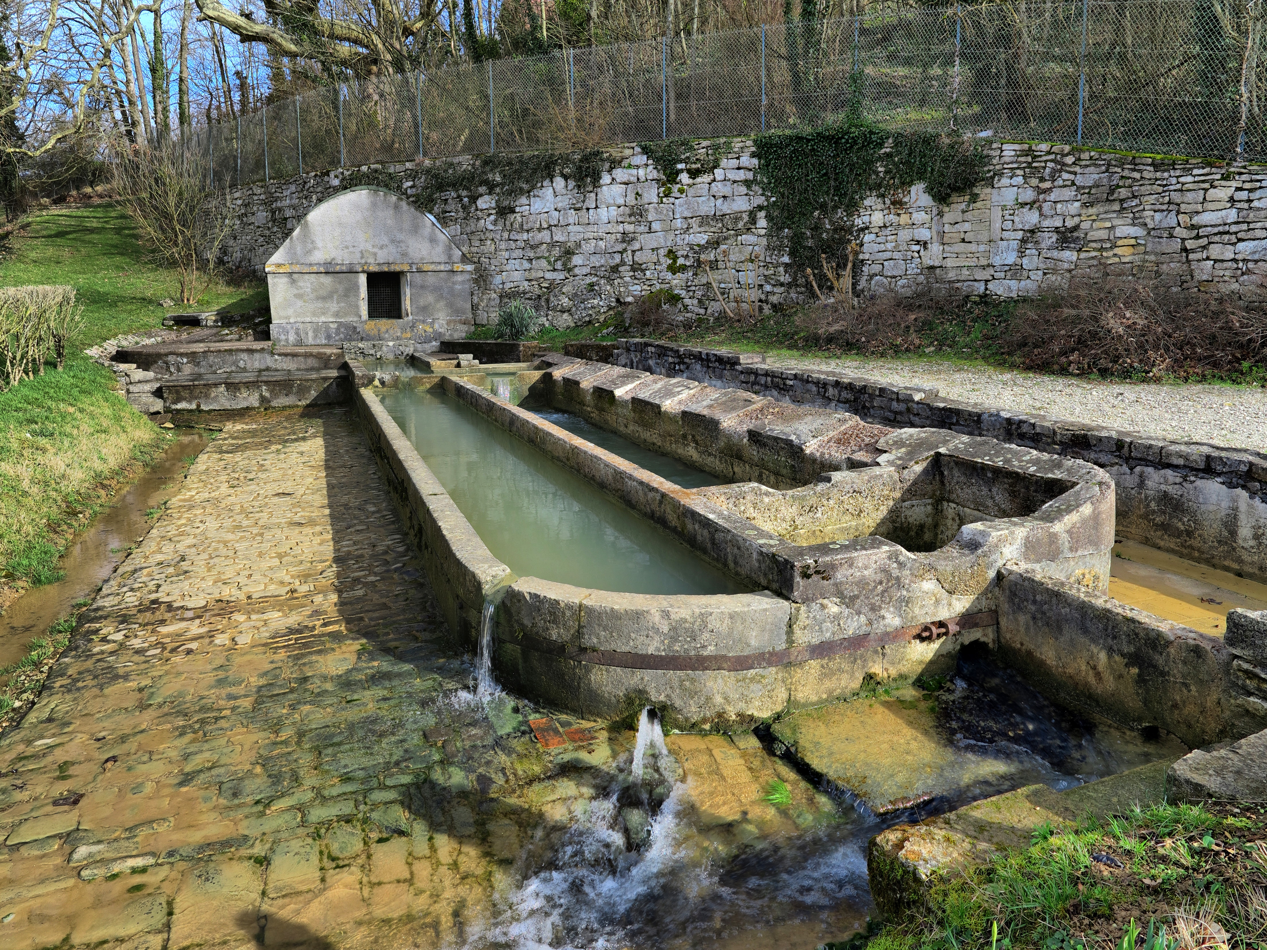 Le lavoir-abreuvoir